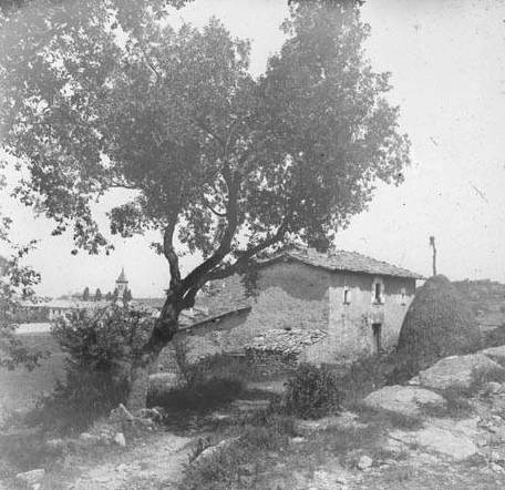 Vista general de Lo Perer. Frederic Bordas i Altarriba (ca. 1890)